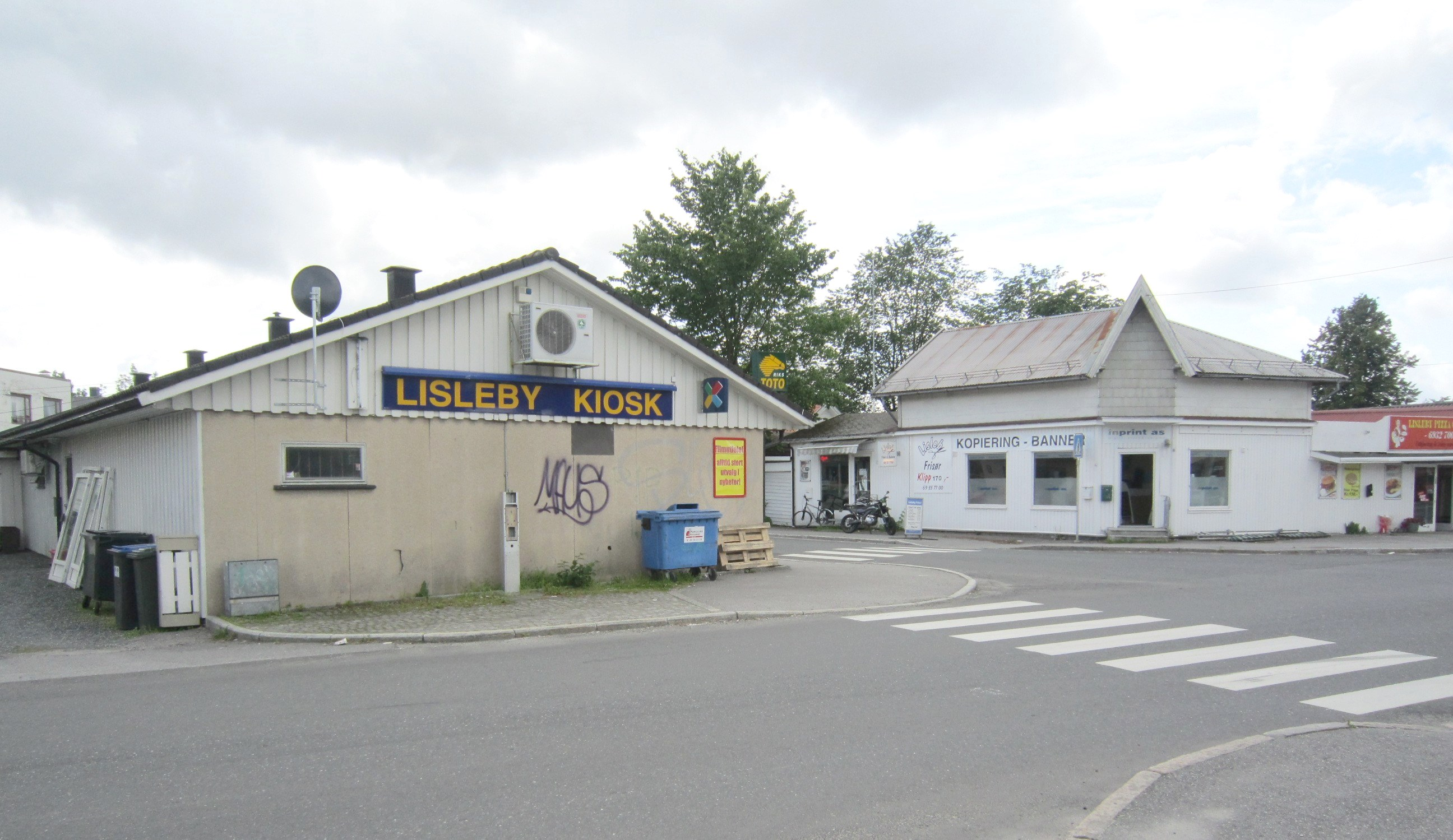 Fra Lisleby